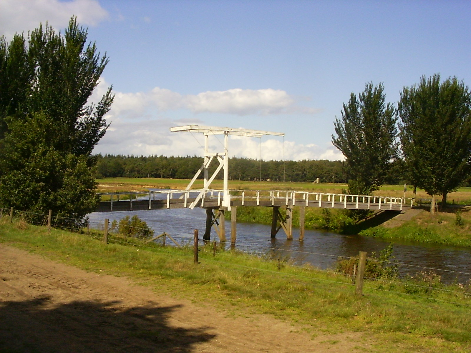 Giethemerkerkbrug over de Regge tussen Giethmen en Ommen